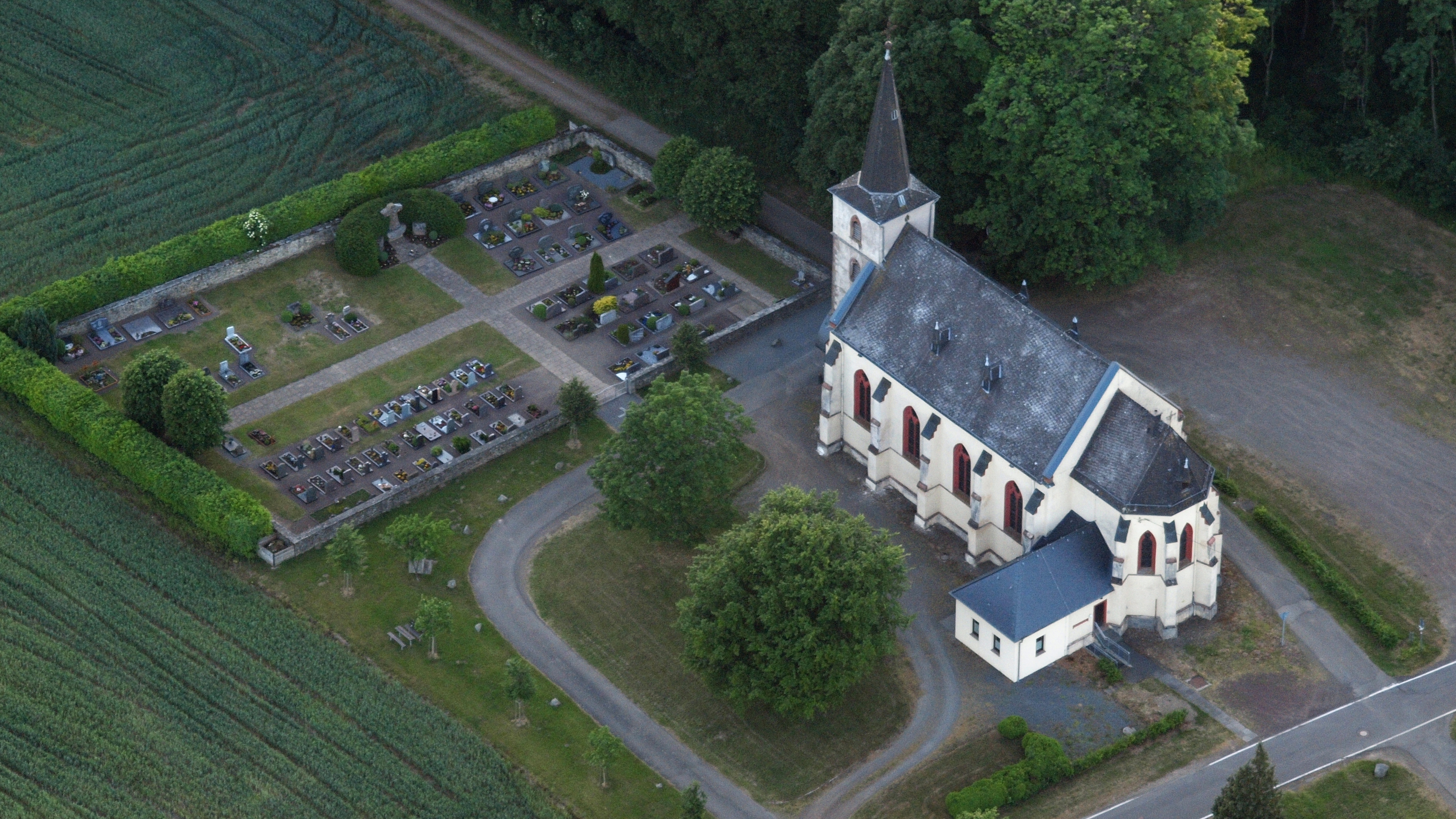 Kloster Buchholz, Plantenburg, Luftaufnahme (2015)